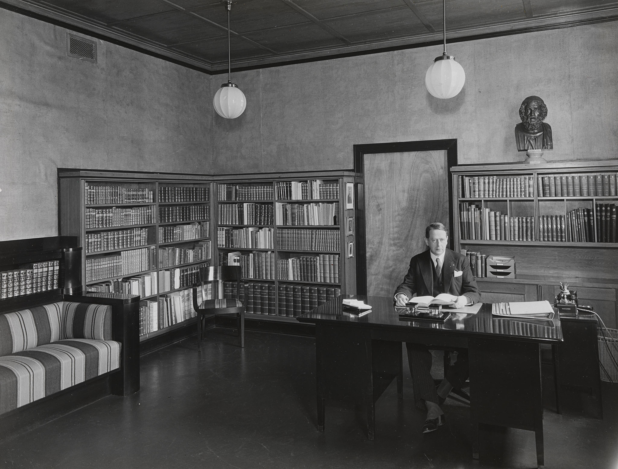 Tittel / Title: Overbibliotekar Wilhelm Munthe (1883-1965) på sitt kontor Beskrivelse / Description: Dengang Universitetsbiblioteket. Dato / Date: mars 1937 Fotograf / Photographer: ukjent / unknown Sted / Place: Oslo, Henrik Ibsens gate 110, Nasjonalbiblioteket Eier / Owner Institution: Nasjonalbiblioteket / National Library of Norway Lenke / Link: Bildesignatur / Image Number: blds_04008